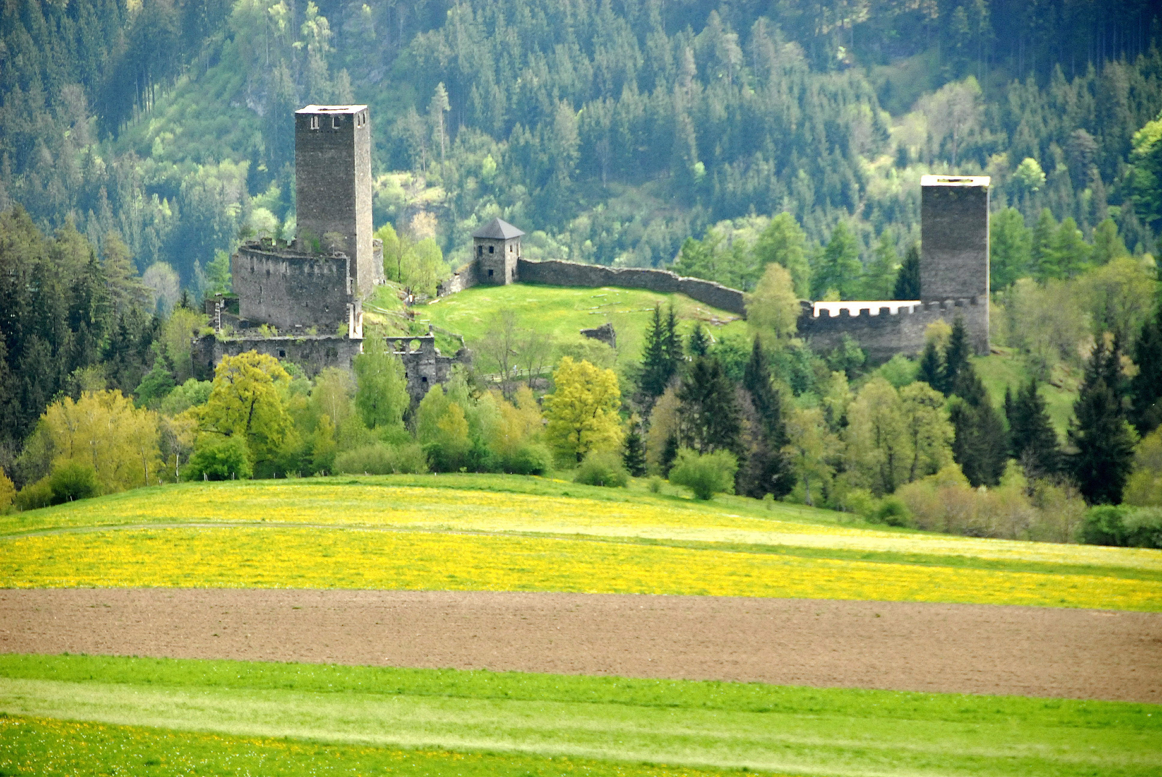 Castle-ruin Liebenfels in the community Liebenfels, district Sankt Veit an der Glan, Carinthia, Austria